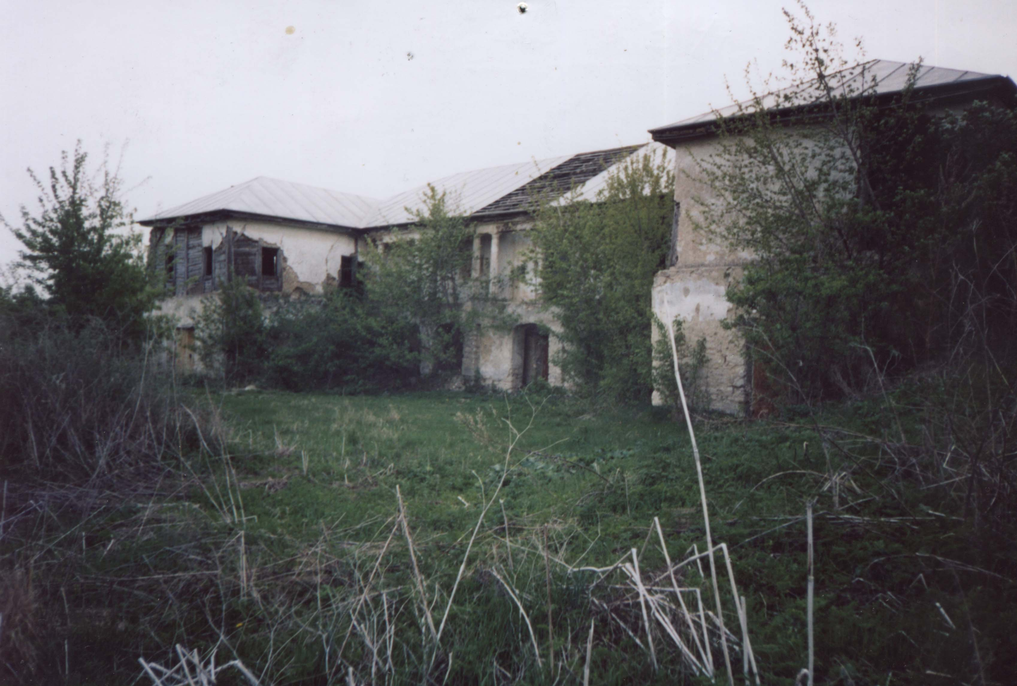 Пам'ятка архітектури